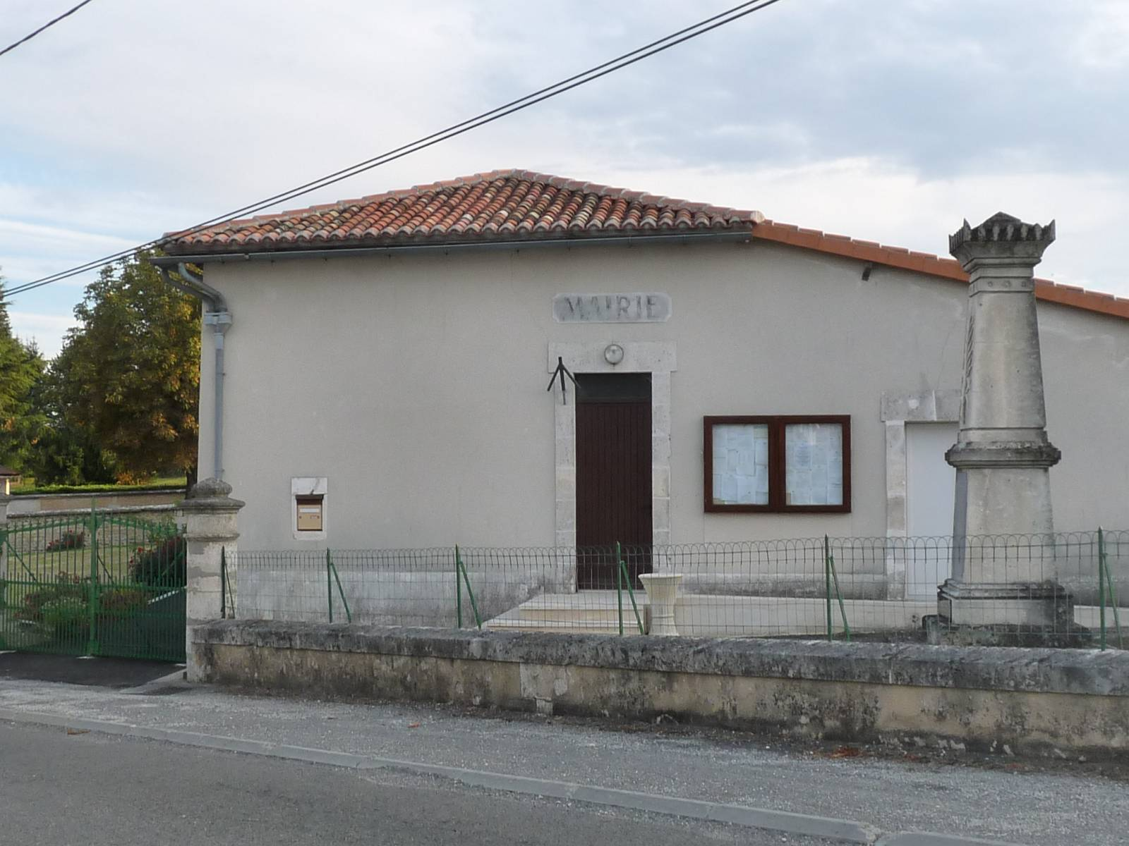 mairie d'Etriac, Charente, France